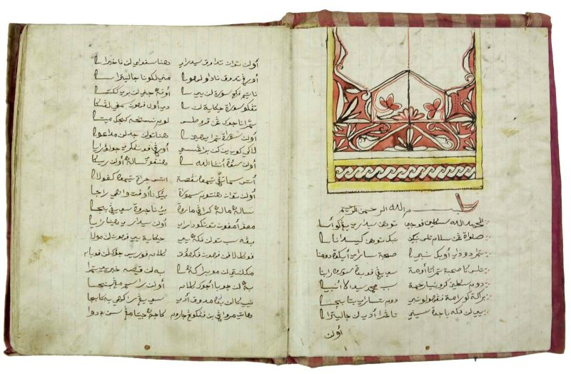 Acèh: Hikayat Banta Neuransah